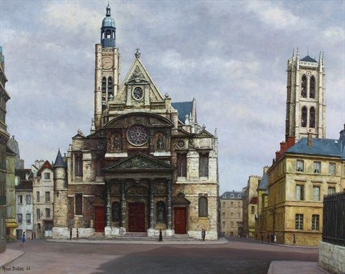 Paris France l'Eglise Ste Genevieve